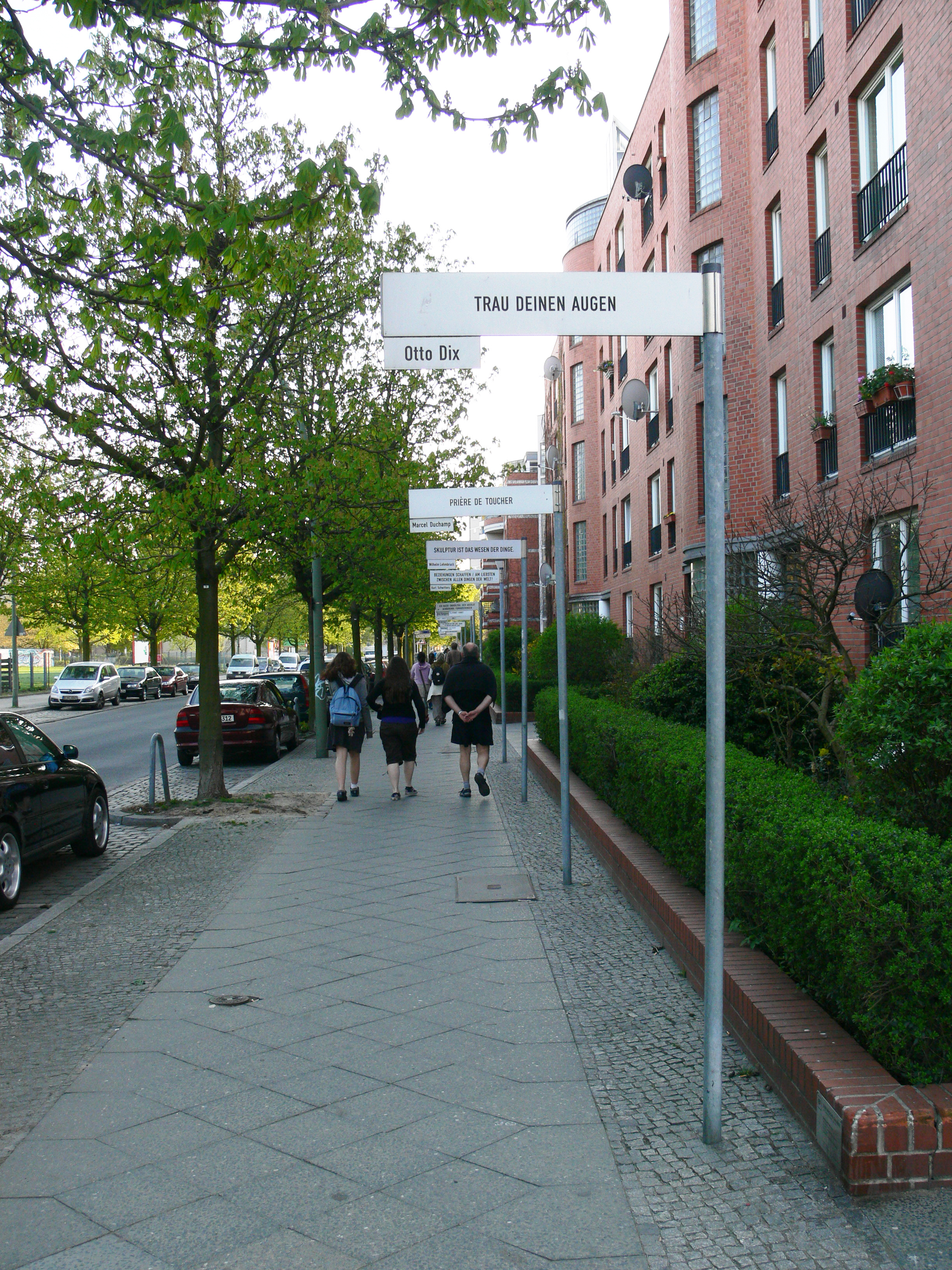 Berlin-Kreuzberg, Alte Jakobstraße, Außenbereich Berlinische Galerie Silvia Breitwieser: Botschaften - Die berlinische Botschaft, ein Trajekt, 1996/1997, 32 Schilderobjekte